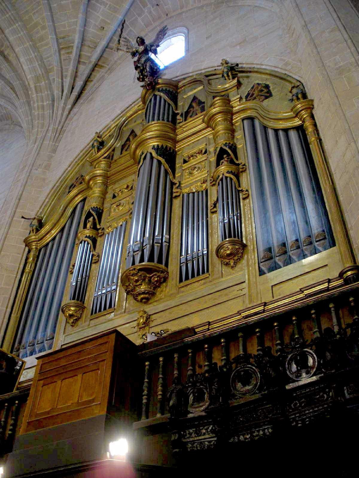 Catedral de Calahorra (La Rioja)